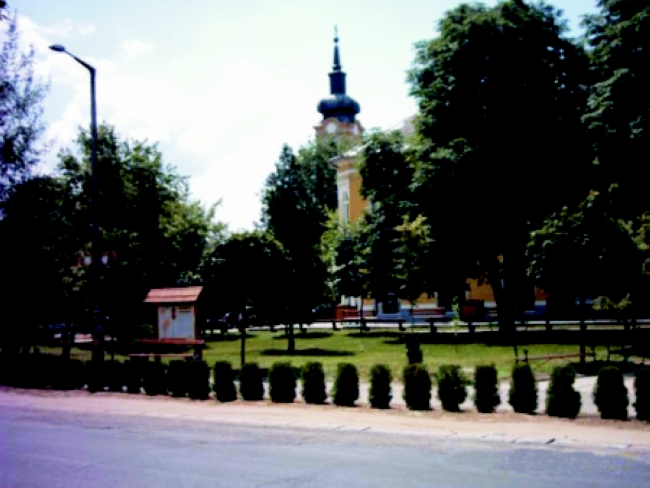 Újfehértó